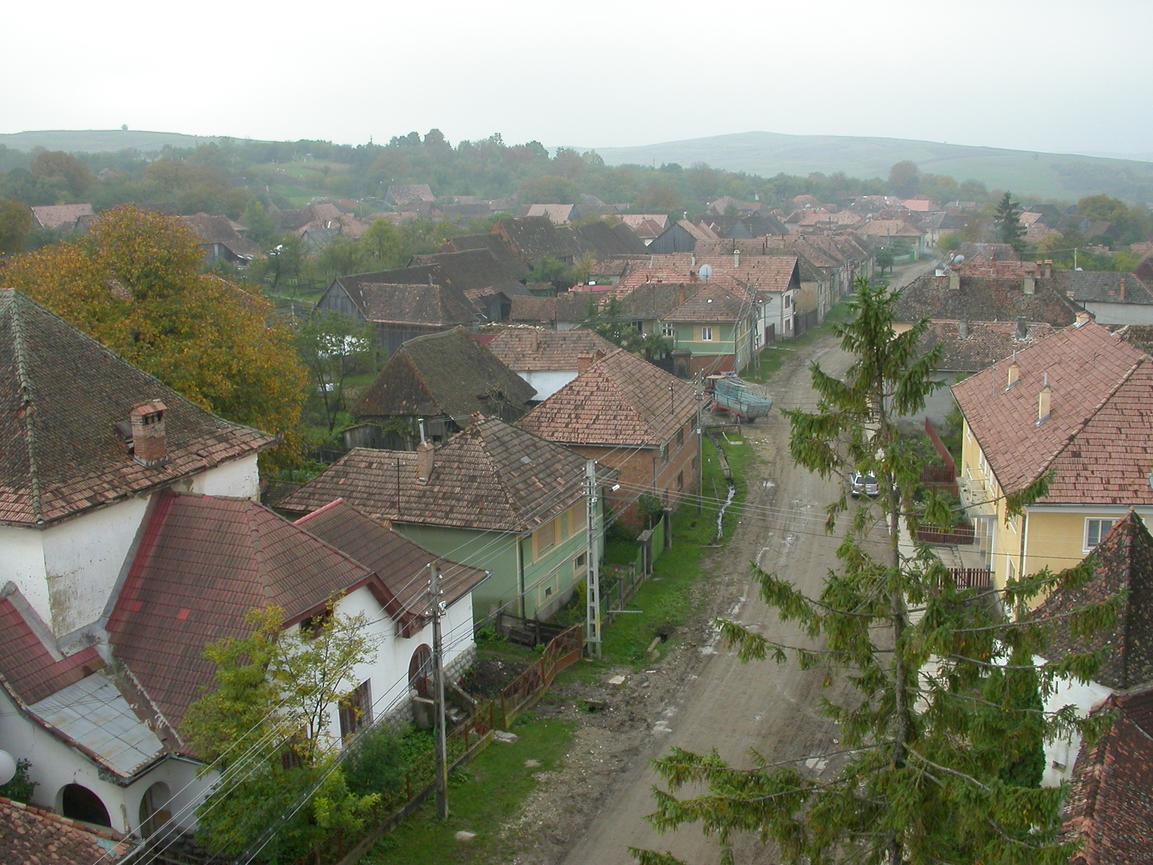 Situl rural Dârjiu, sec. XV - XX